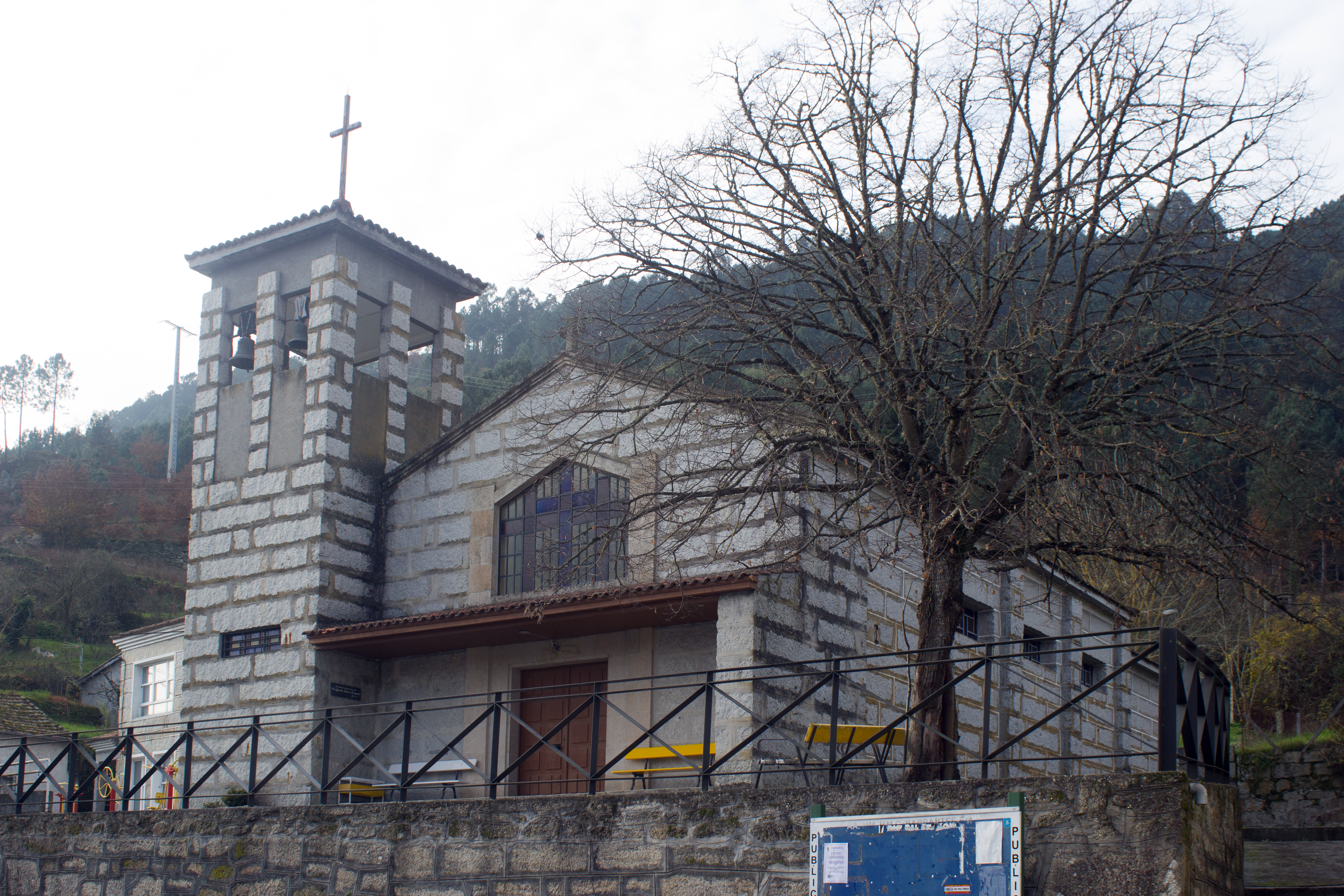 Igrexa de Santo Antonio da Barca de Barbantes, no concello de Cenlle.